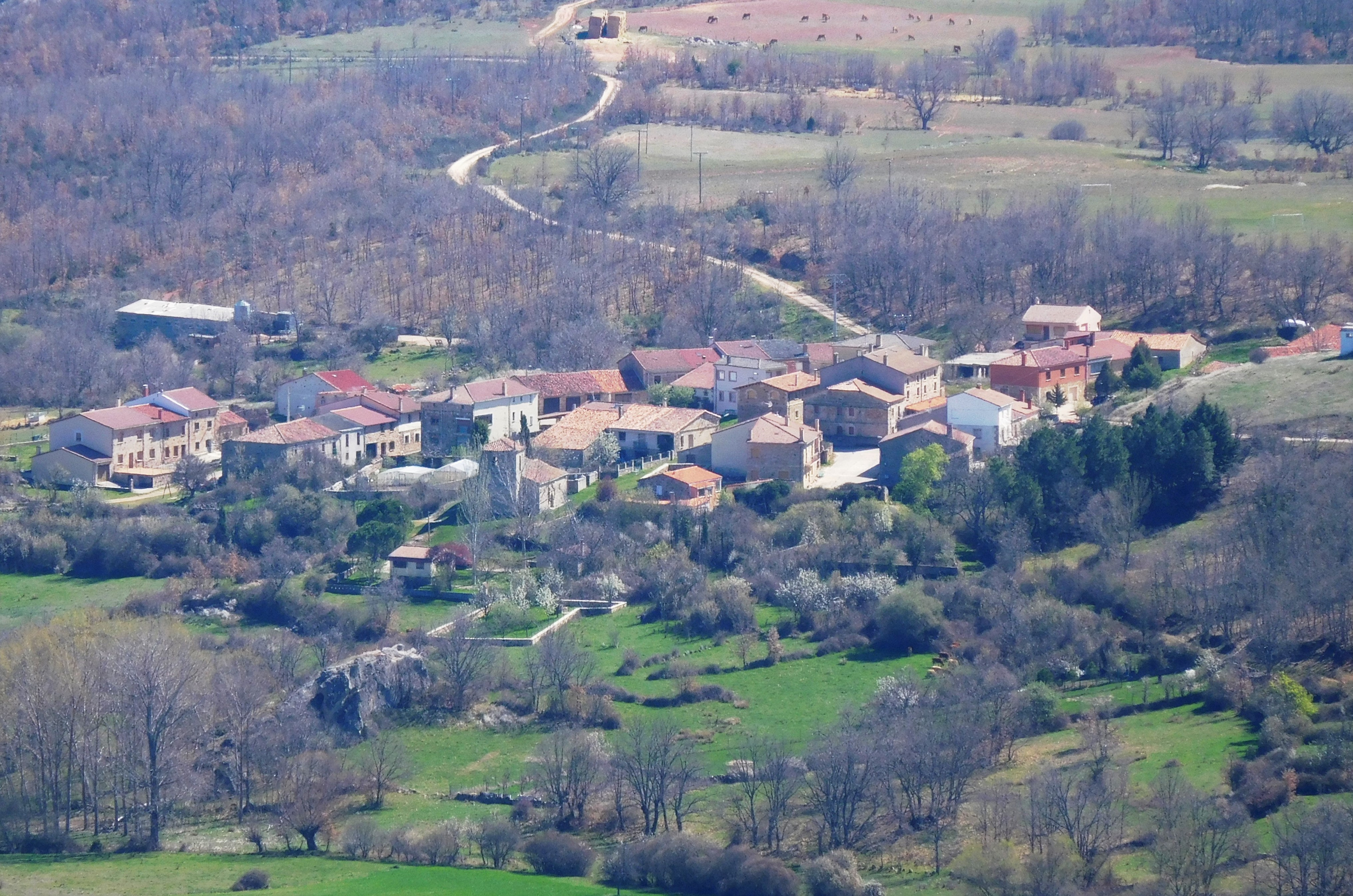 Gete (Burgos) foto Matallana